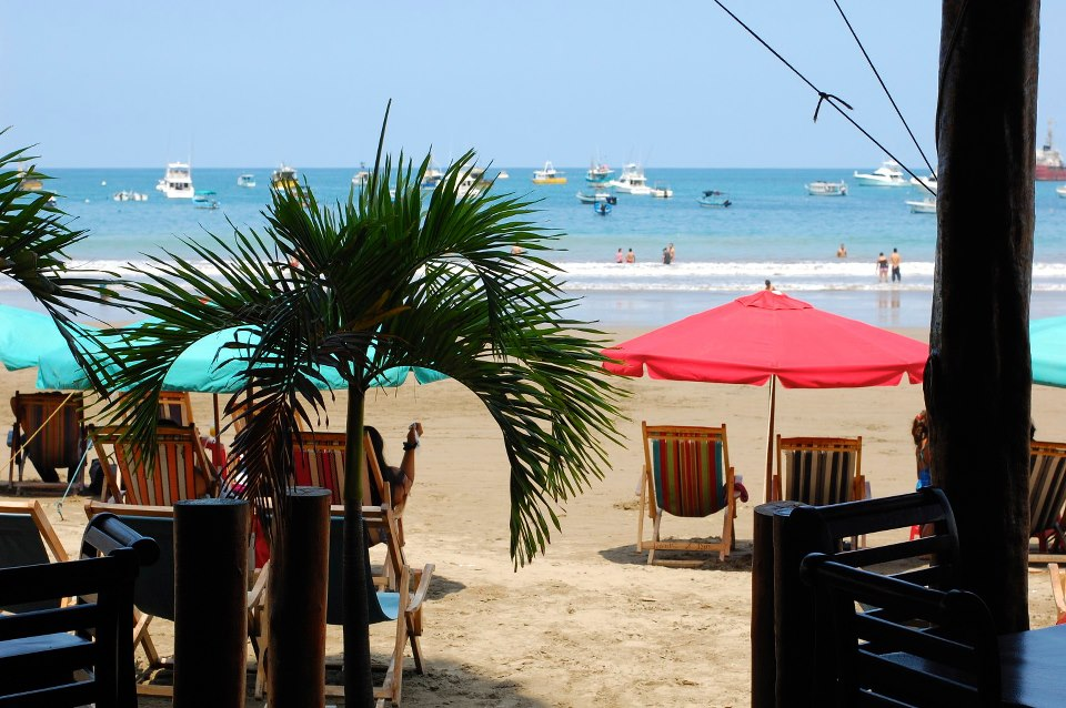 Playa de San Juan